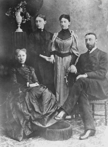 Александра Николаевна Неплюева, урожденная баронесса Шлиппенбах с детьми.